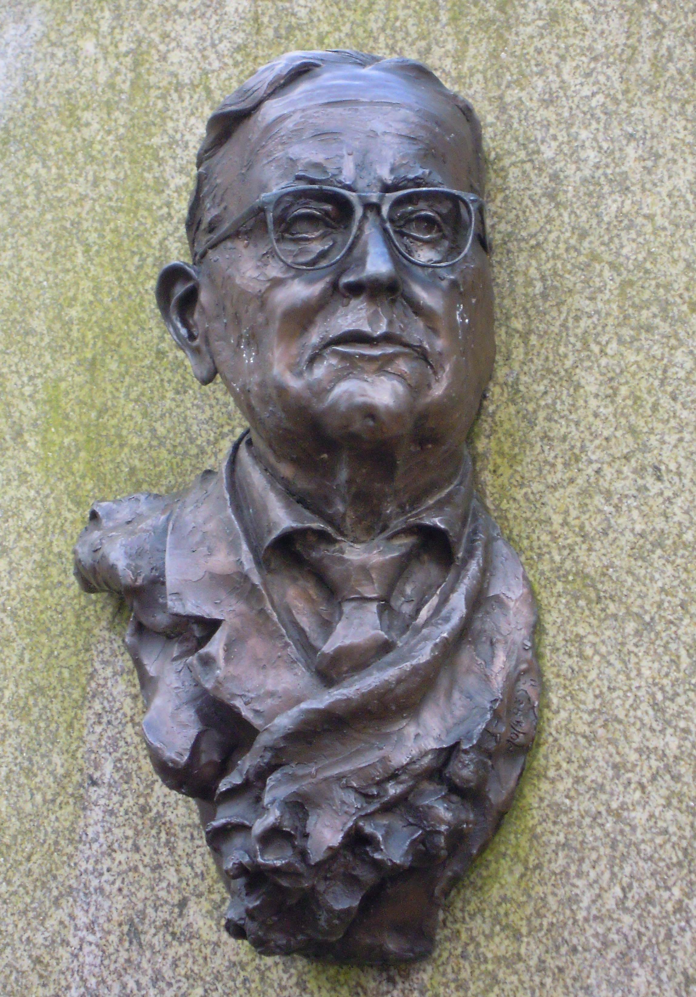 Escultura de José Molares na praza de Fermín Bouza Brey de Pontevedra, adicada a dito autor